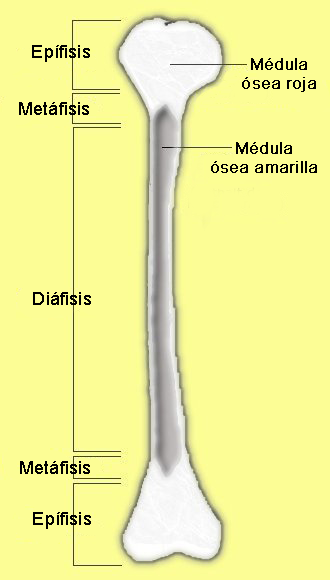 Partes de un hueso largo con rótulos en español.